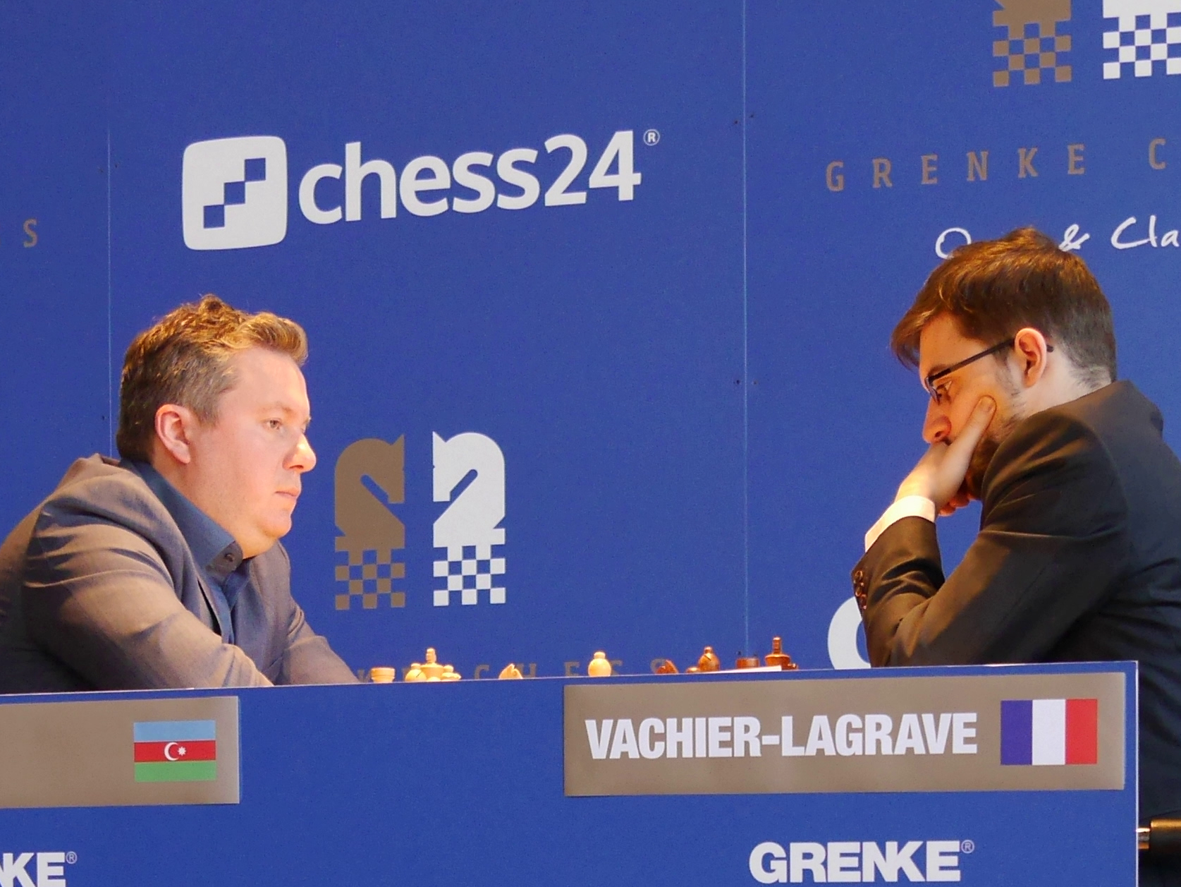 Arkadij Naiditsch - Maxime Vachier-Lagrave, Runde 1 Grenke Chess Classic 2018 in Karlsruhe.